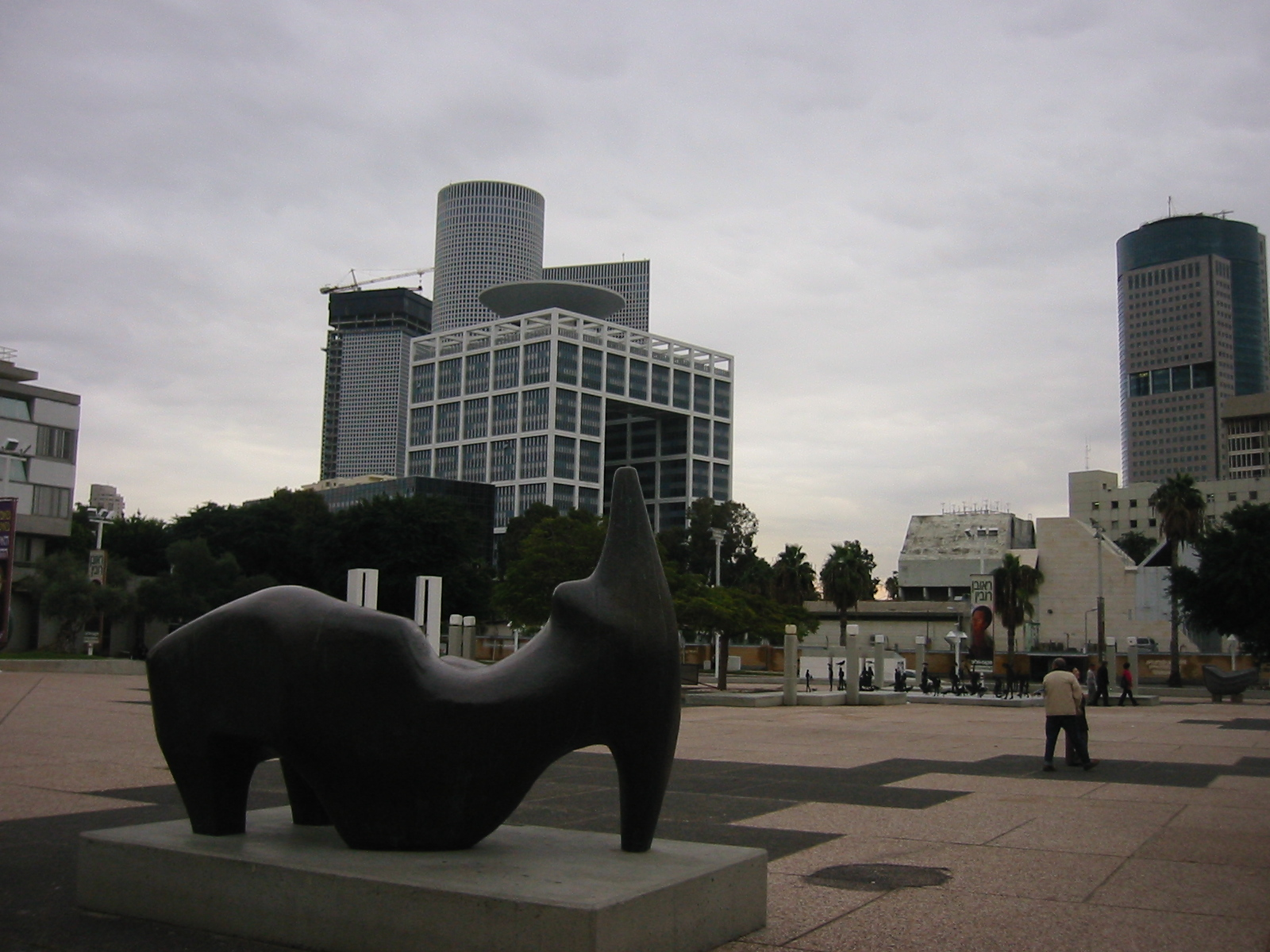 Muzej umetnosti.